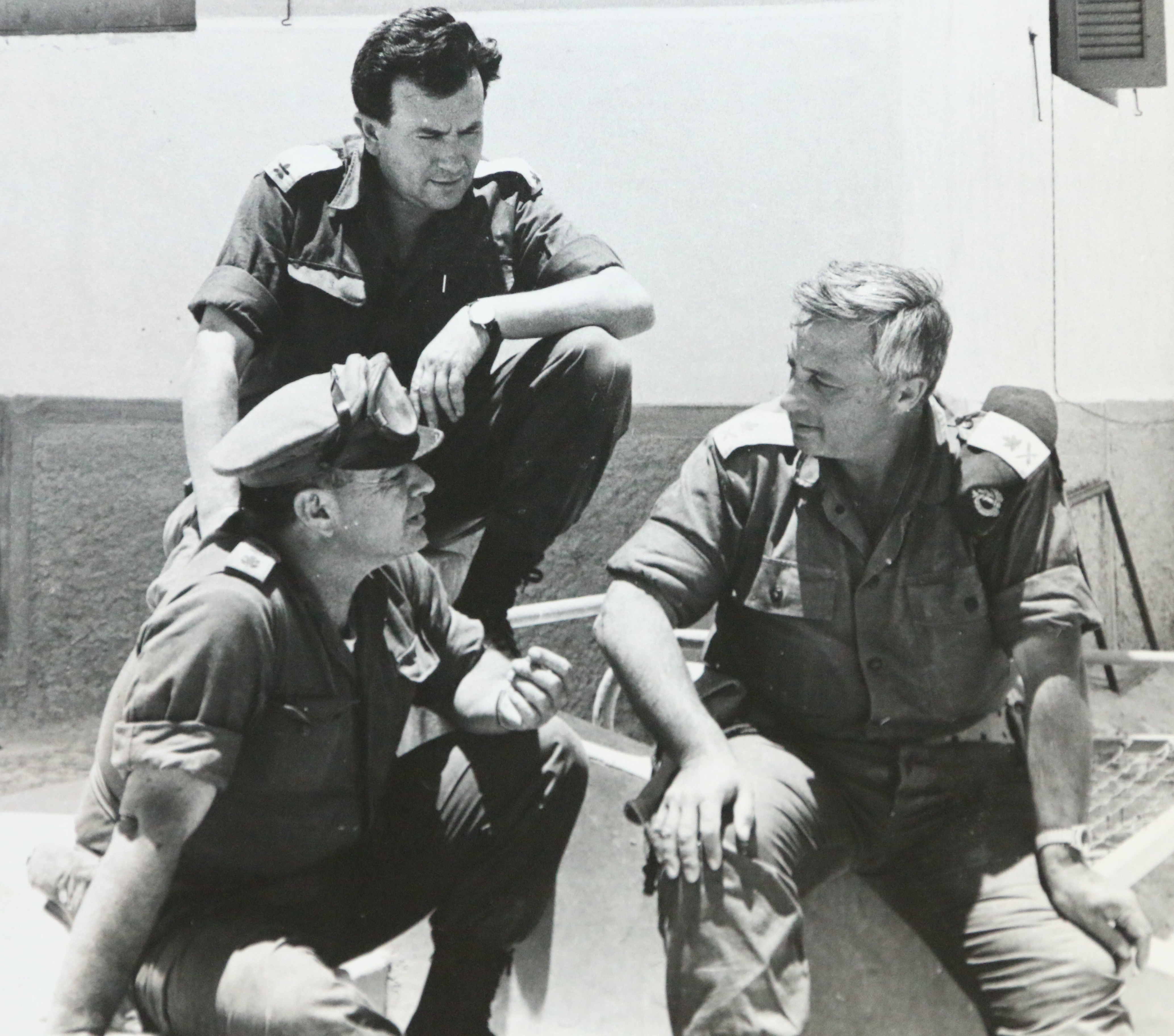 מפקד האוגדה אריאל שרון בהתייעצות בזמן מלחמת יום הכיפורים 1973 ולצידו רב סרן יהודה אילן קציון חינוך דרום